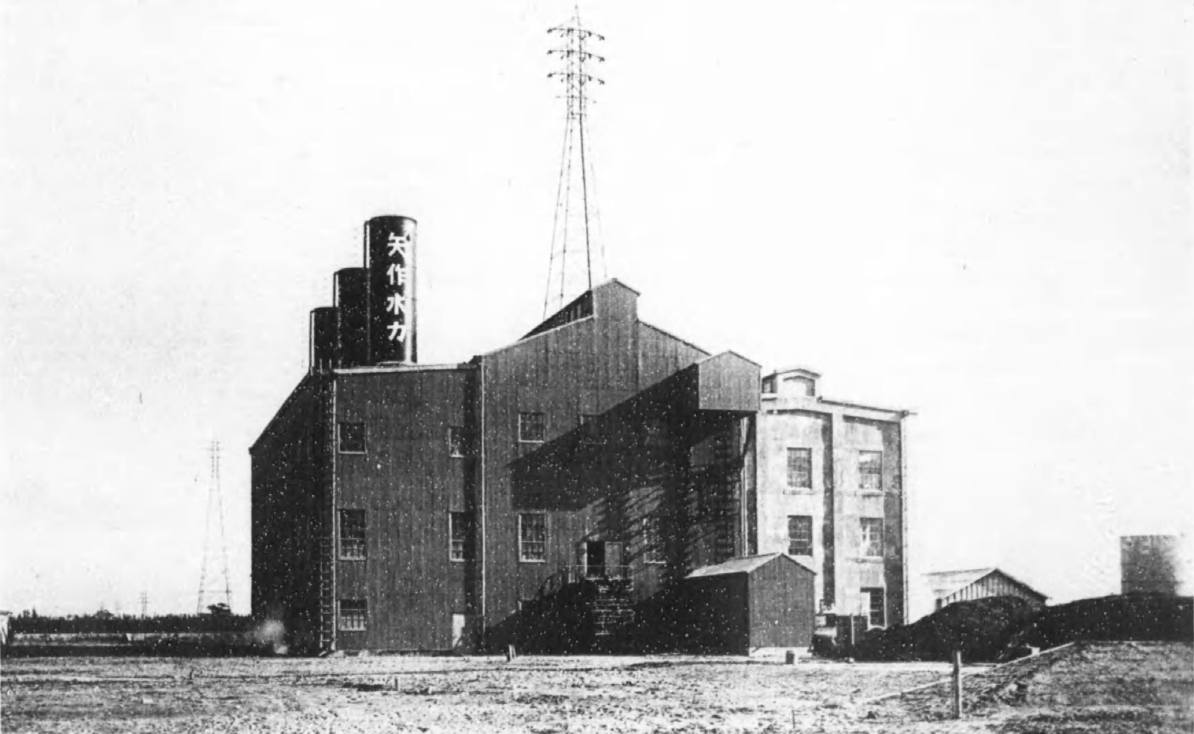 名古屋市港区昭和町にあった矢作水力名古屋火力発電所（1939年廃止）